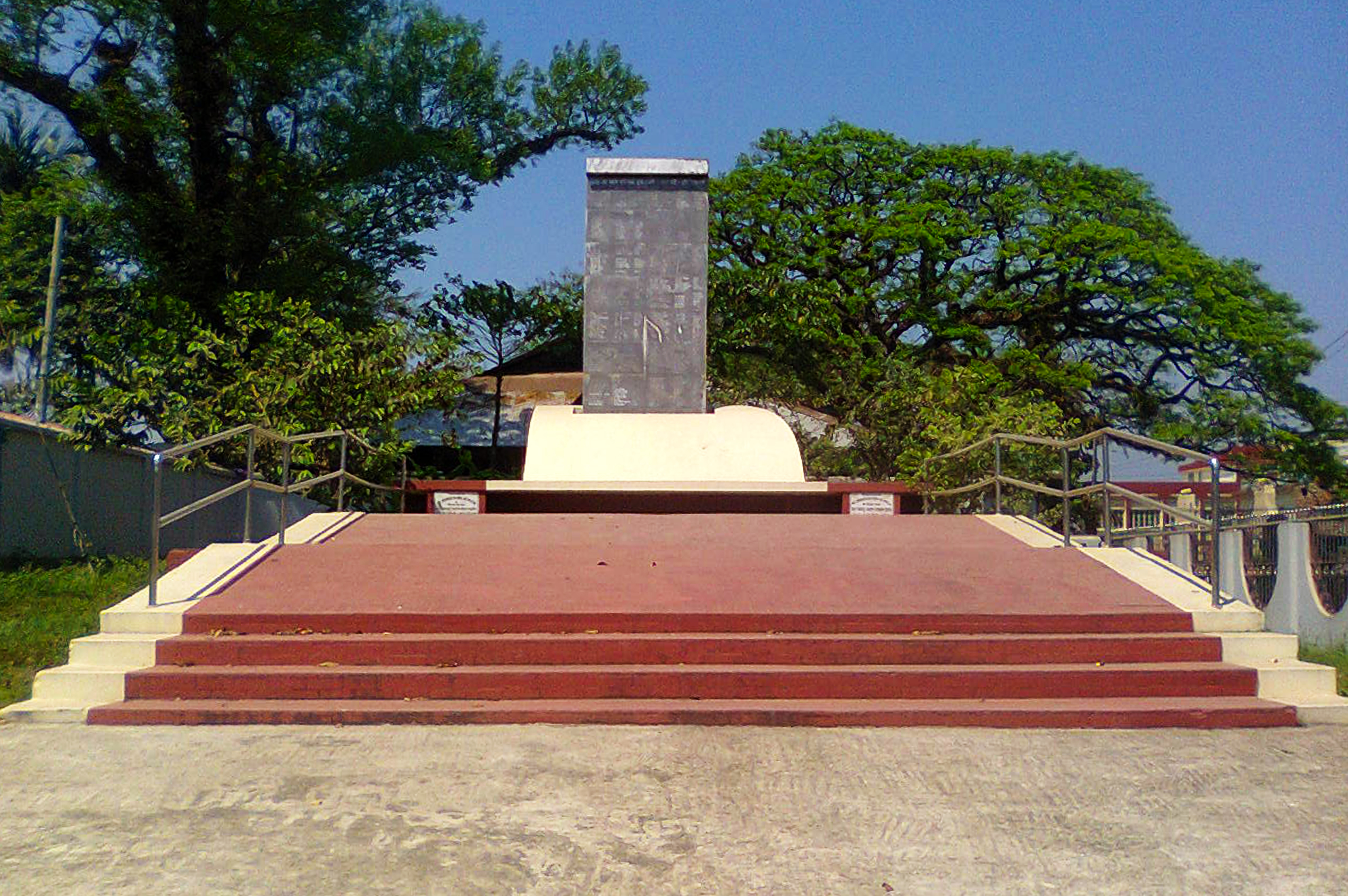 ফেনীর শহীদ মুক্তিযোদ্ধাদের স্মৃতিস্তম্ভ।